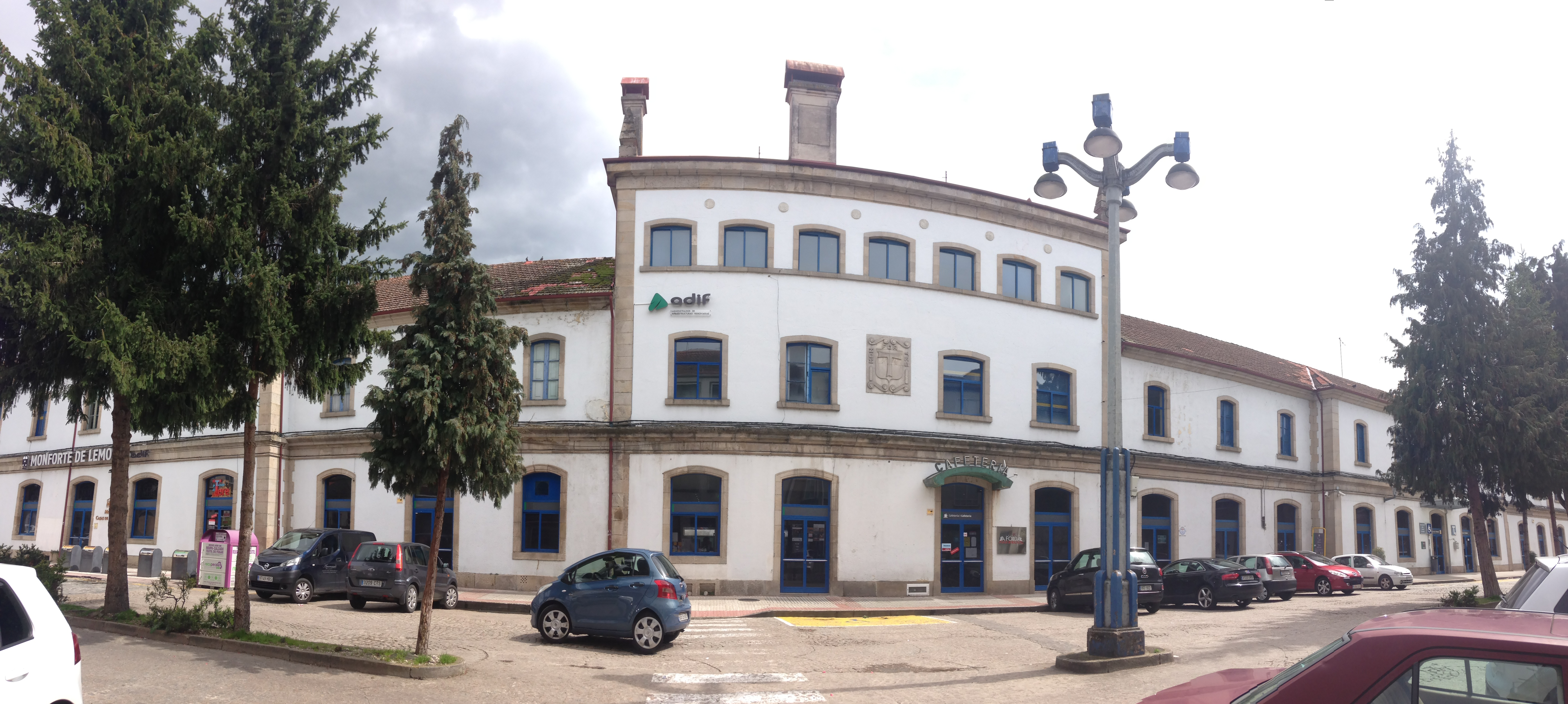 Panorámica da estación de Monforte de Lemos.